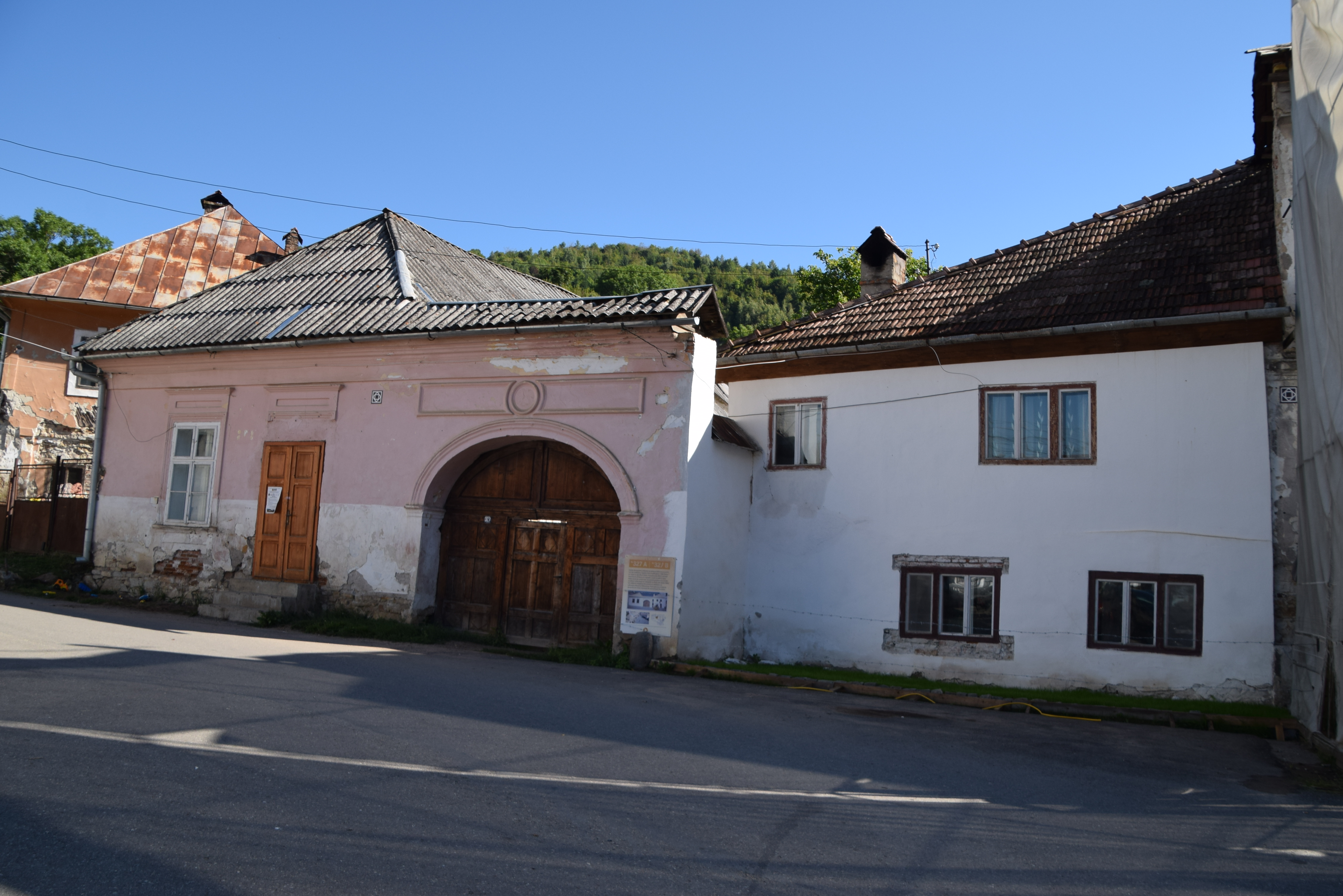 Casă, nr. 327, Roșia Montană, Alba